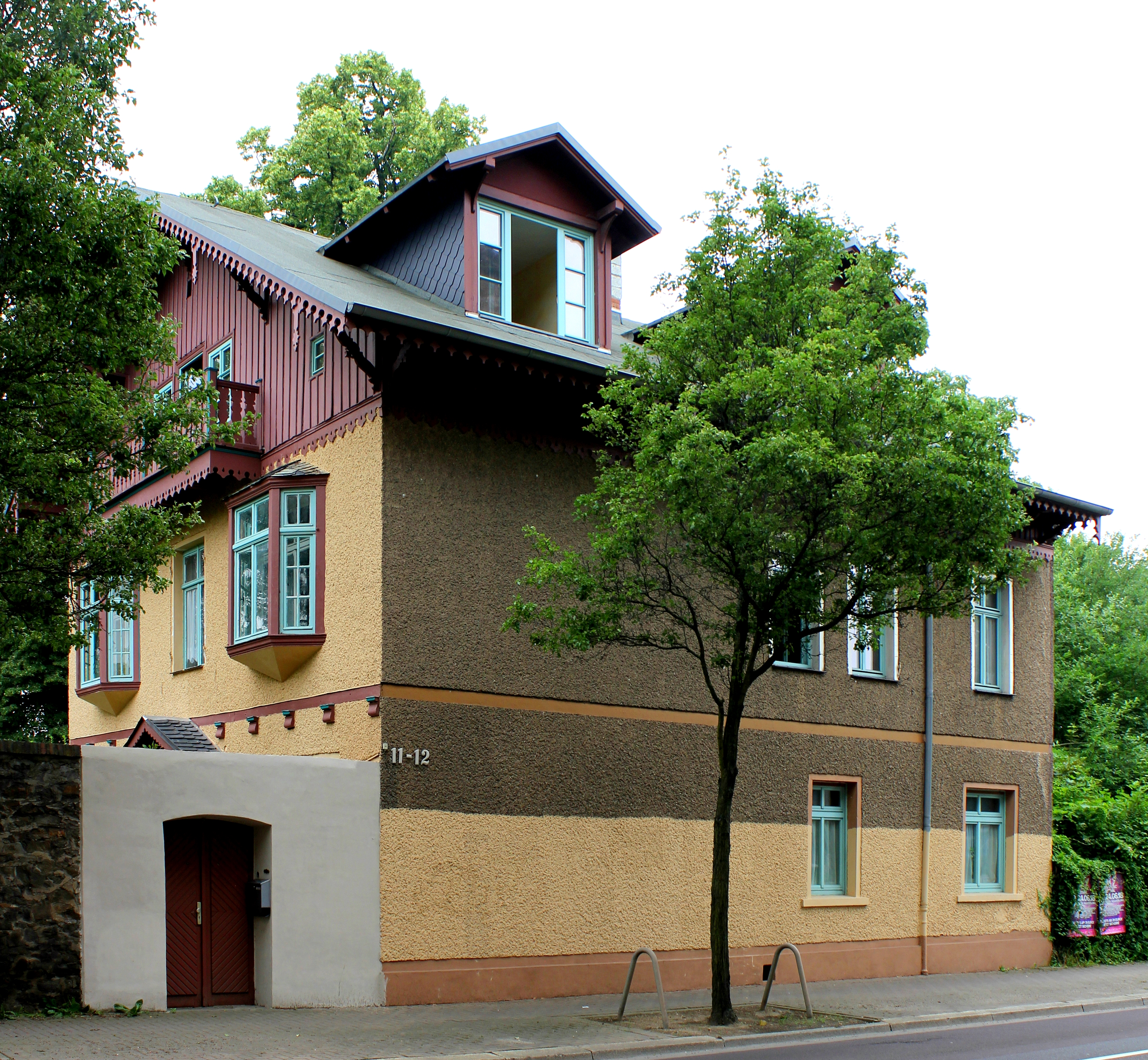 Wohnhaus, Mittagstraße 11, 12, Magdeburg